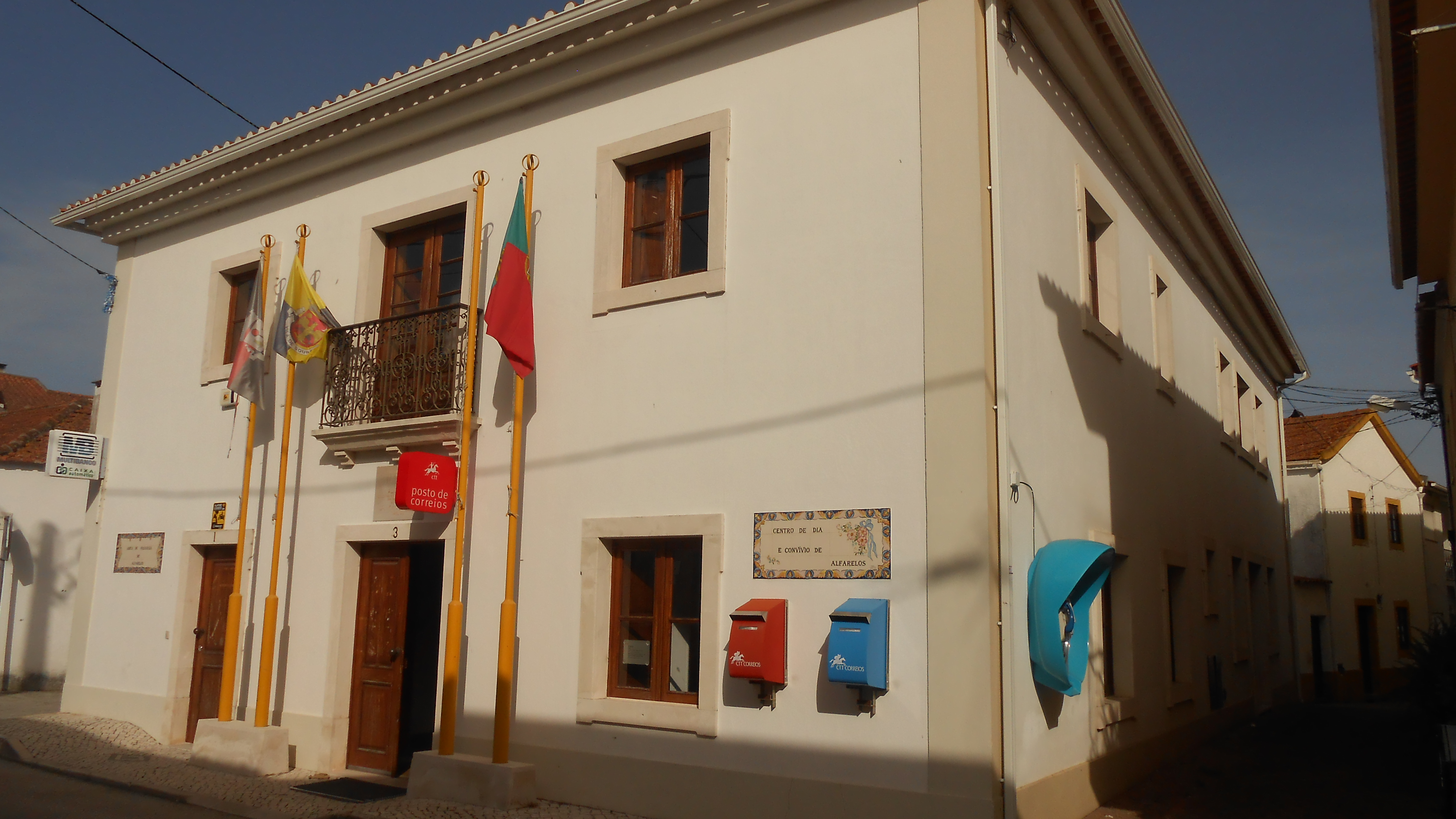 Junta de freguesia em Alfarelos.